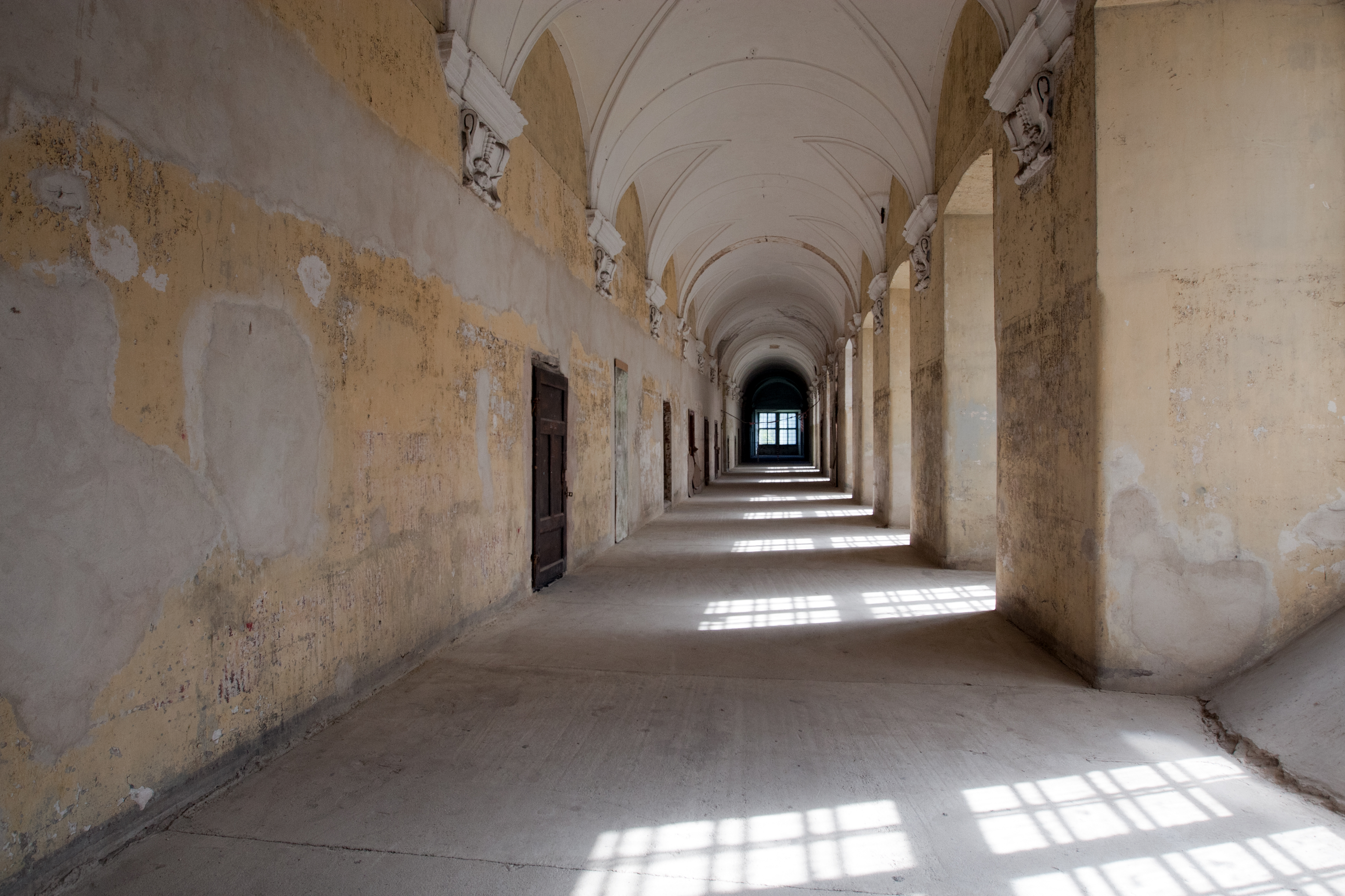 Opactwo cystersów w Lubiążu – korytarz klasztorny